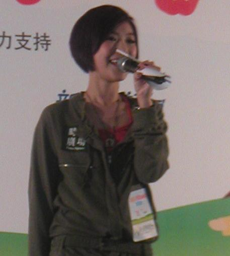 范萱蔚